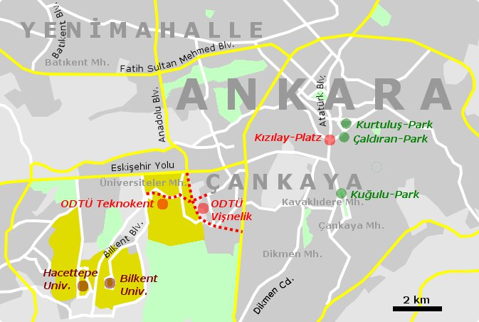 Karte zur Übersicht über einige Orte in Ankara im Zusammenhang mit Protesten im Jahr 2013 ; cf. Böyle olur Melih Gökçek’in ulaşım planı... (türkisch), soL, 17. August 2013; ODTÜ'de yol eylemi (türkisch), Zaman, 27. August 2013, von Ünal Livaneli und Yavuz Akengin; ODTÜ: Planda iki yol var, sonradan eklenilene karşıyız (türkisch), T24, 4. September 2013; ODTÜ'de karıştırılan iki farklı yol (türkisch), Hürriyet Ankara, 22. September 2013, von Gamze Kolcu